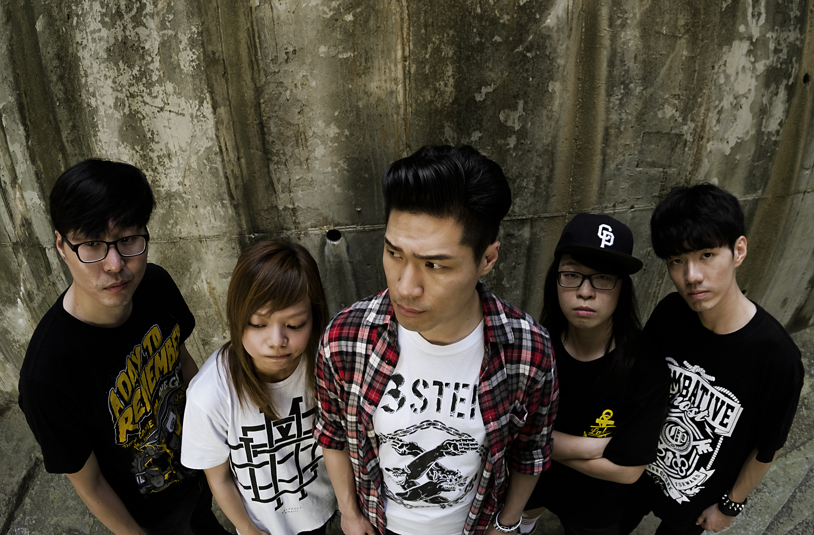 Noeazy profile shot in 2016. From left to right: Hyungki Kim(G), Hayoung Cho(B), Gursong Yoo(V), Yuna Kang(D), Jungjoon Park(G)